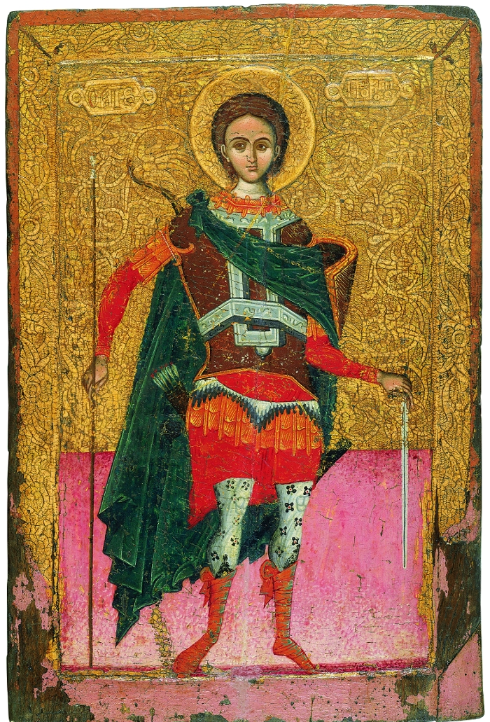 Святой Прокопий в рост. Нач. XVII в.